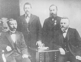 Føroyskt: Fýra av sambandsmonnunum, sum vórðu valdir í 1906. Frá vinstru: Niclas Djurhuus (Sumba), Jóhan C. F. Dam (Kollafirði), Jógvan Poulsen (Strondum) og Óli Niklái Skaalum (Hvalba).